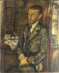 Tableau Portrait de Leopold Zborowski, de Léon Weissberg